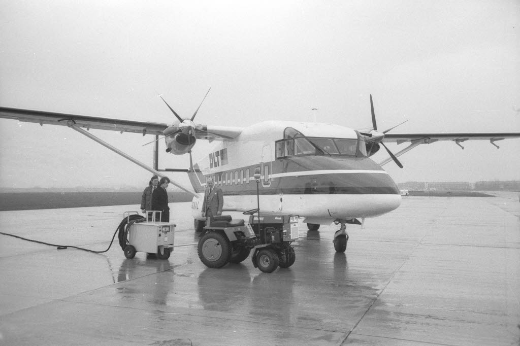 von der Regionalluftverkehrsgesellschaft DLT auf dem Flughafen Holtenau. Die Maschine soll Kiel wieder in das Netz des Regionalluftverkehrs einbeziehen.